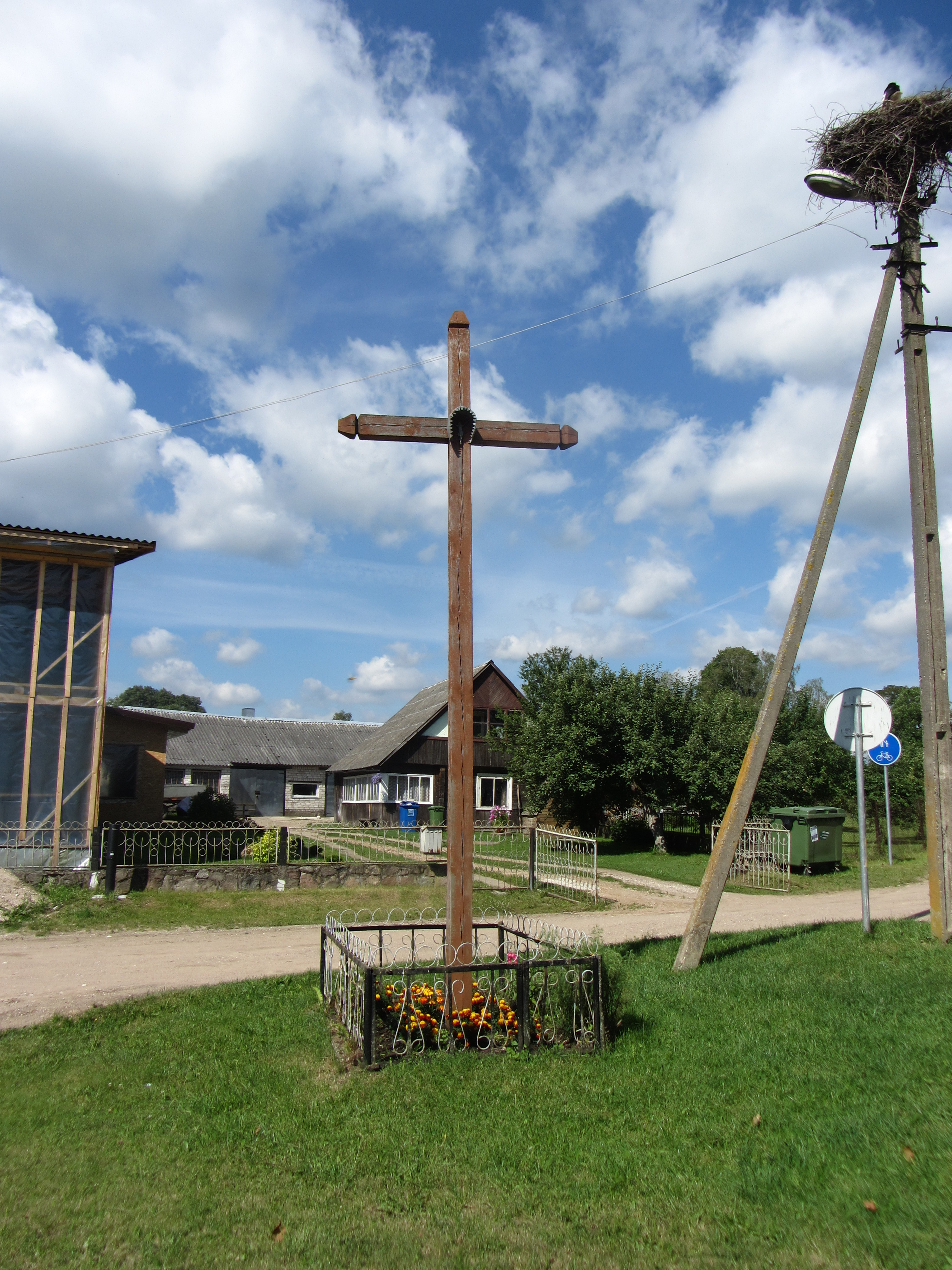 Užuperkasis, Lithuania